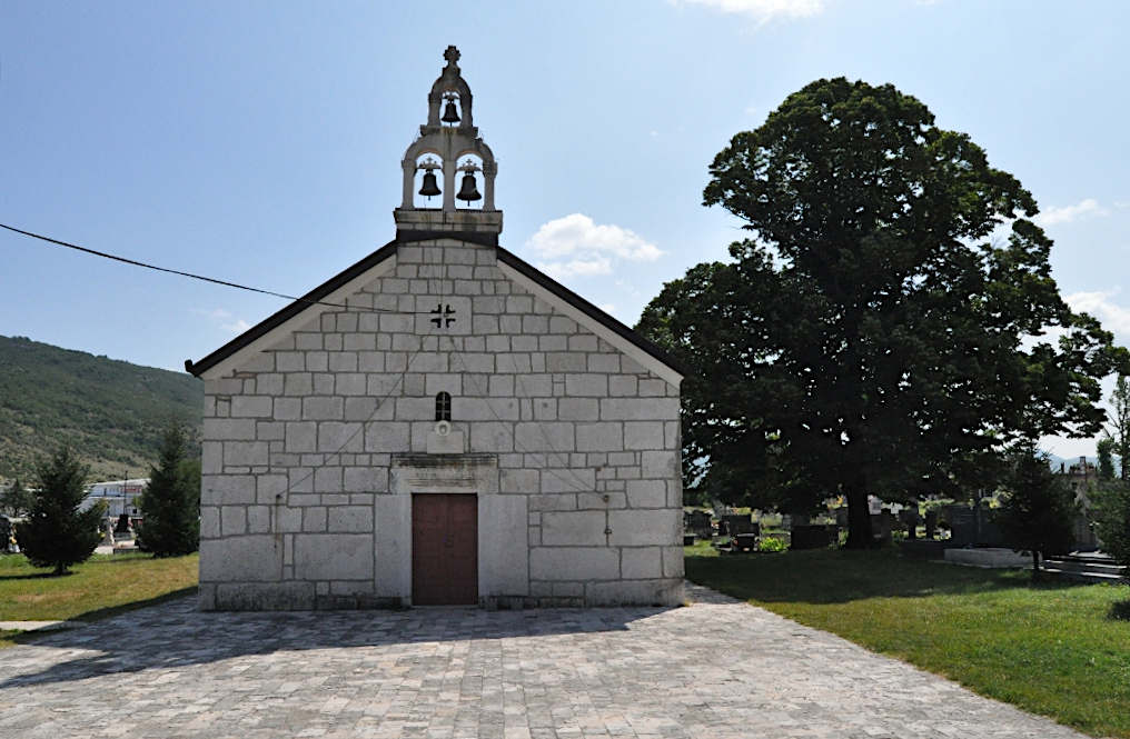 Stara crkva Ljubinje